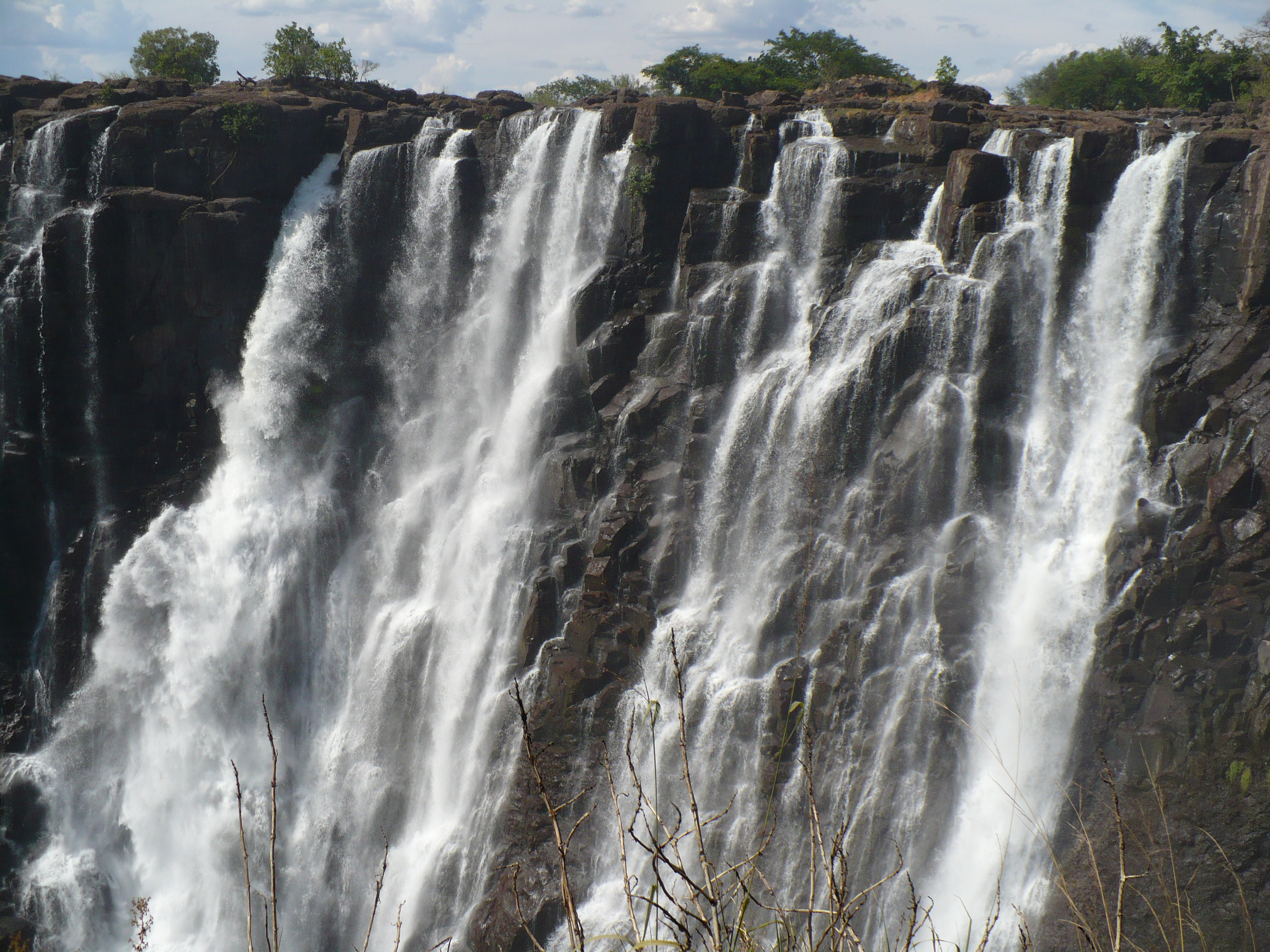 Victoria Falls, Zambian side